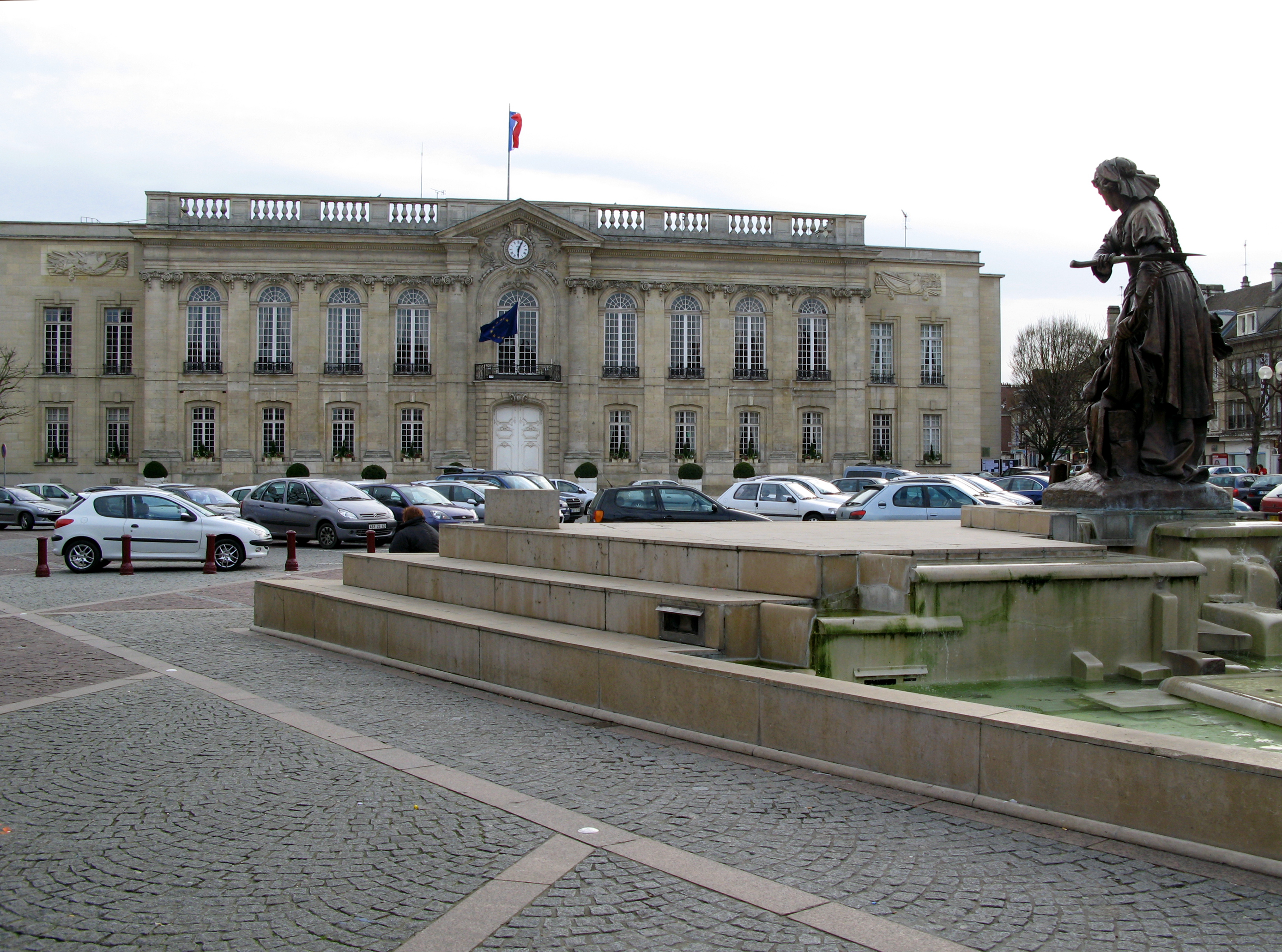 Beauvais (Oise, France) - Statue de Jeanne Hachette face à l'Hôtel-de-ville.